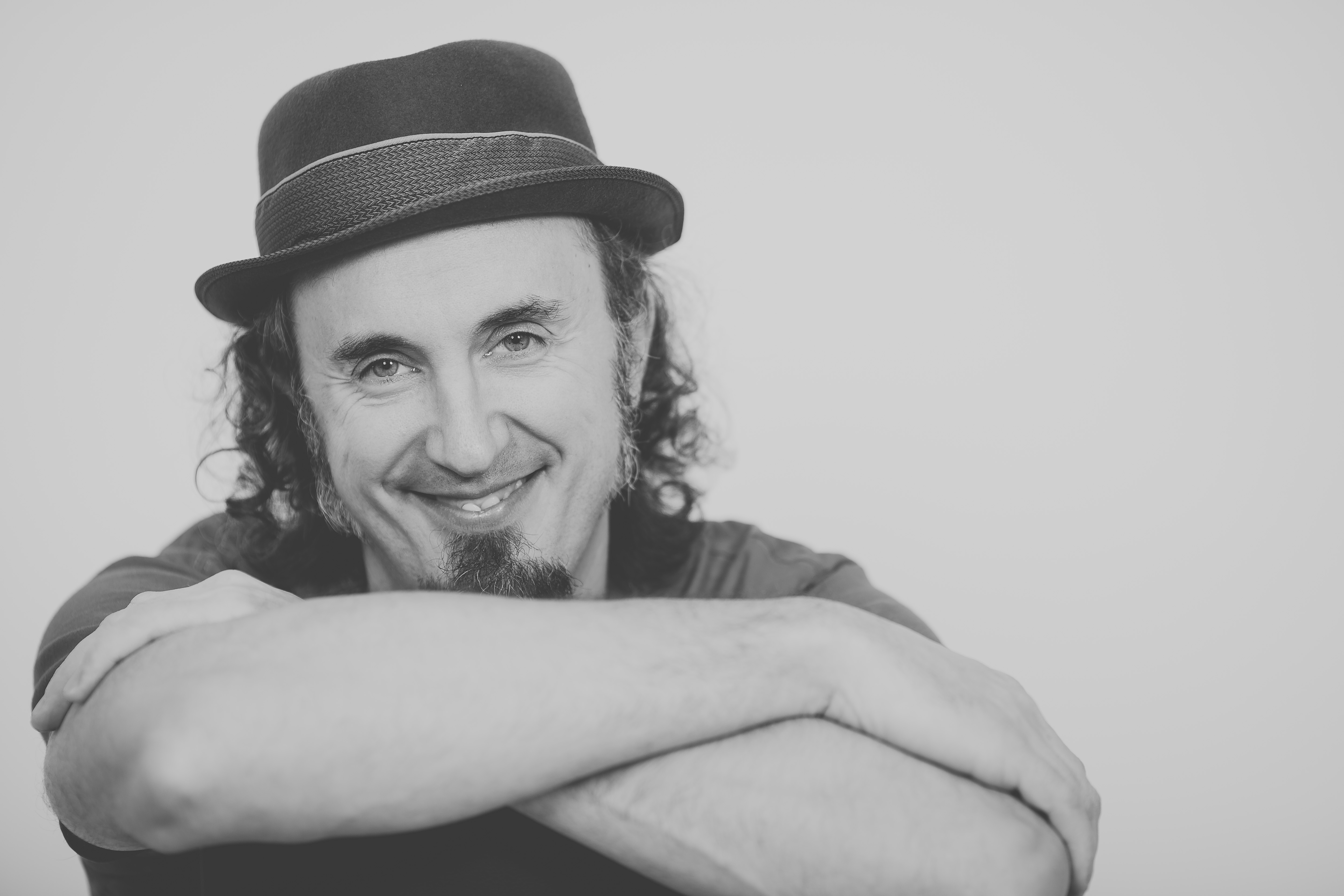 Pepin Banzo